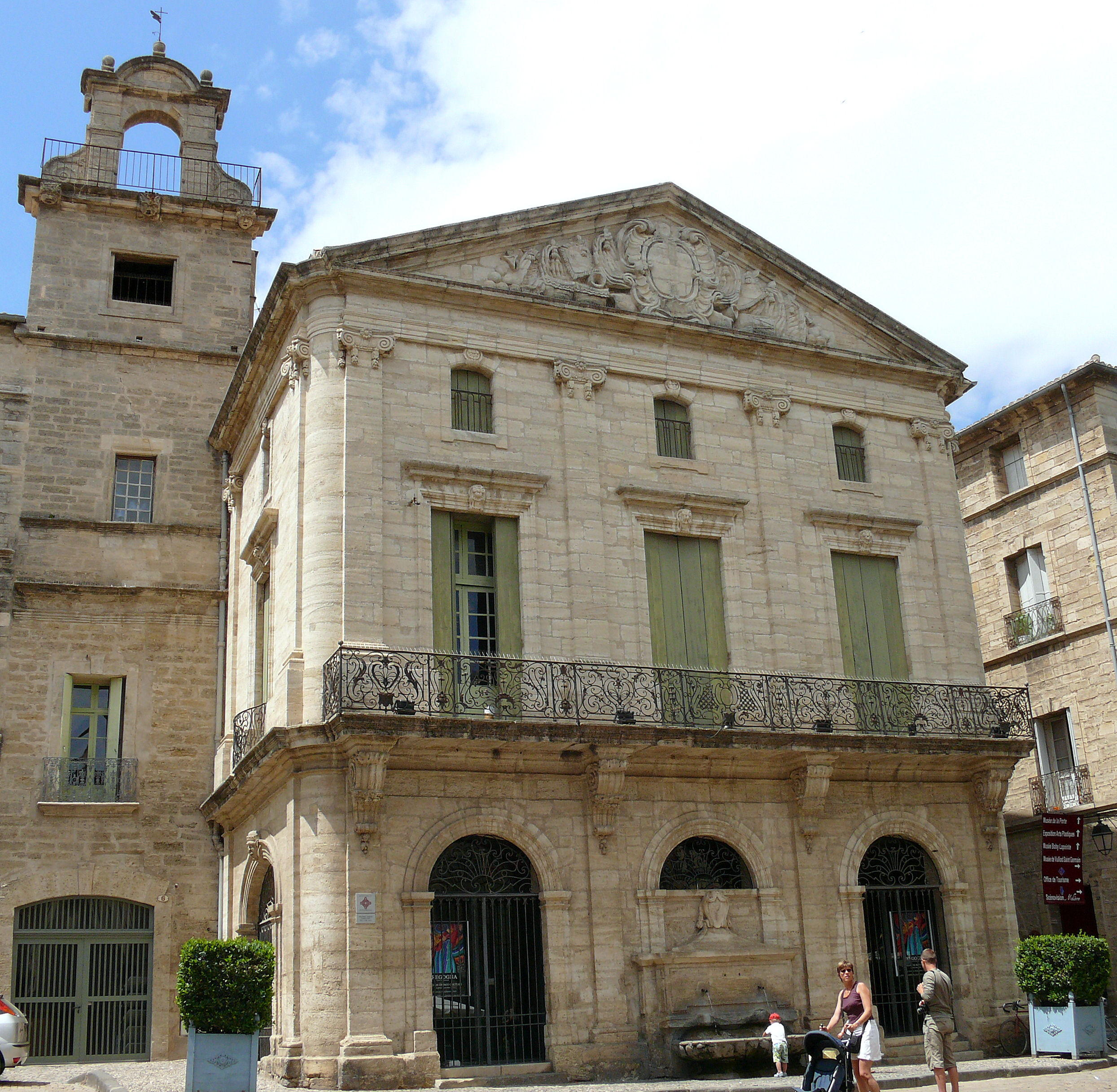 Pézenas - Maison consulaire, 6 place Gambetta